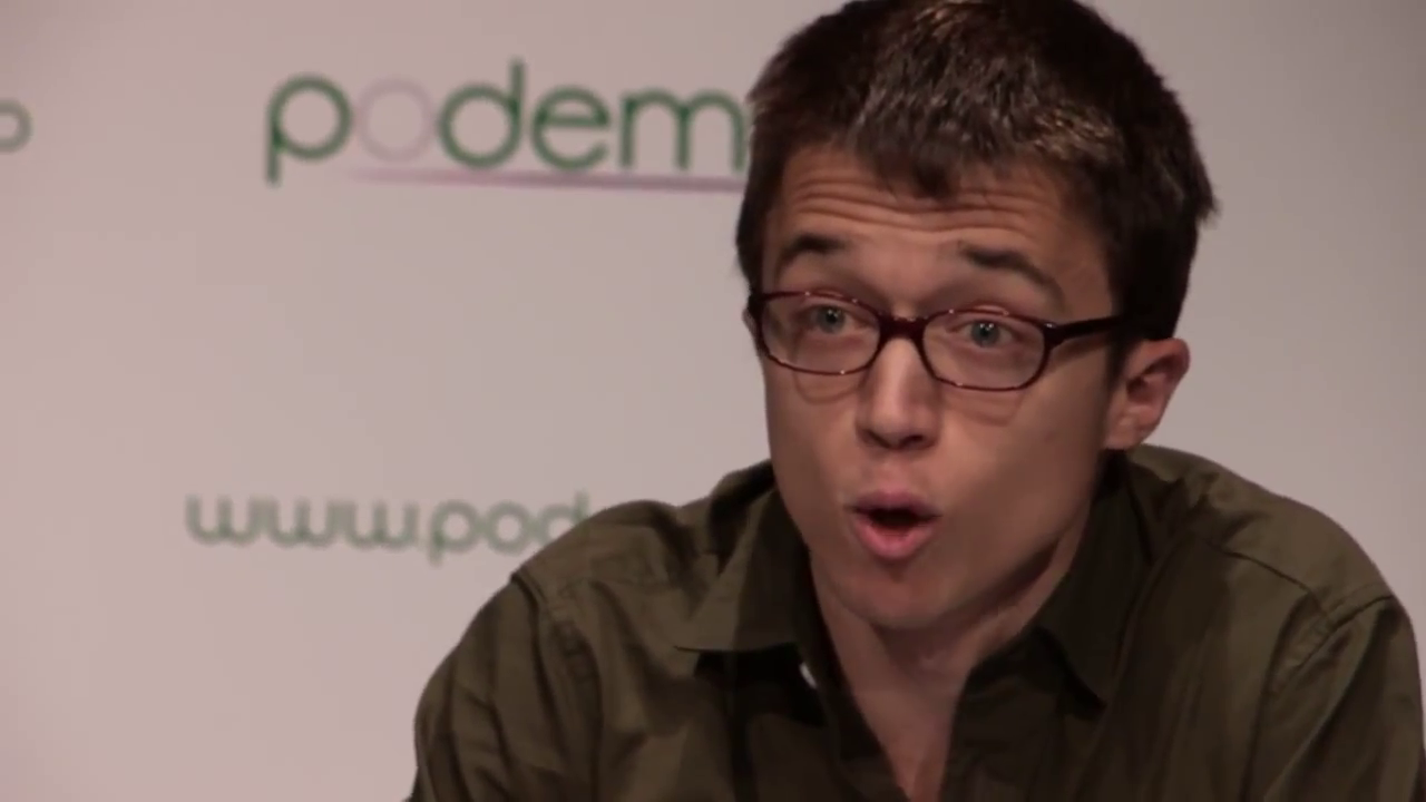 Presentación de Podemos en Madrid (16 de enero de 2014)